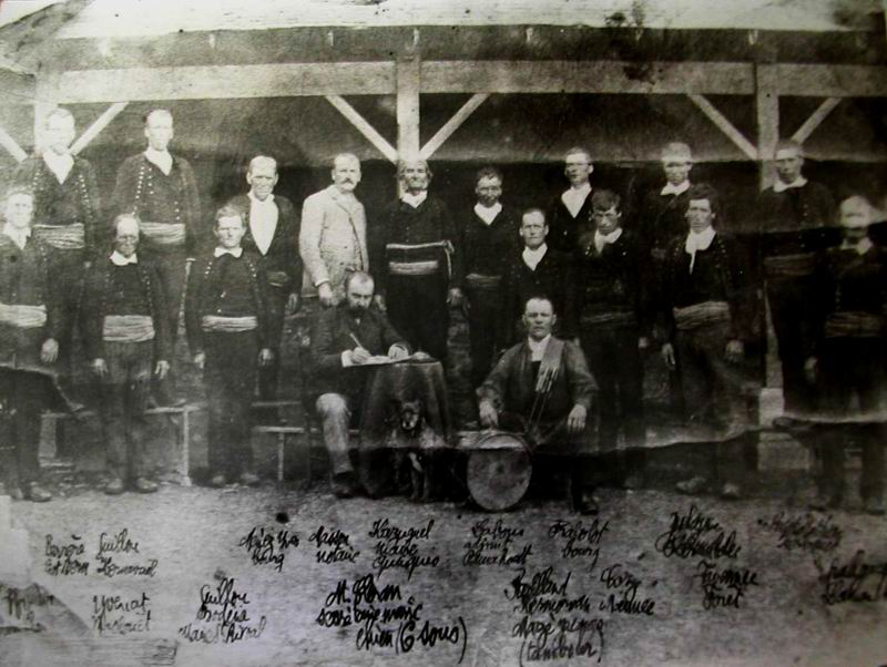 Les membres du Conseil municipal de Brasparts entre 1895 et 1901 (maire : Yves Cazuguel)